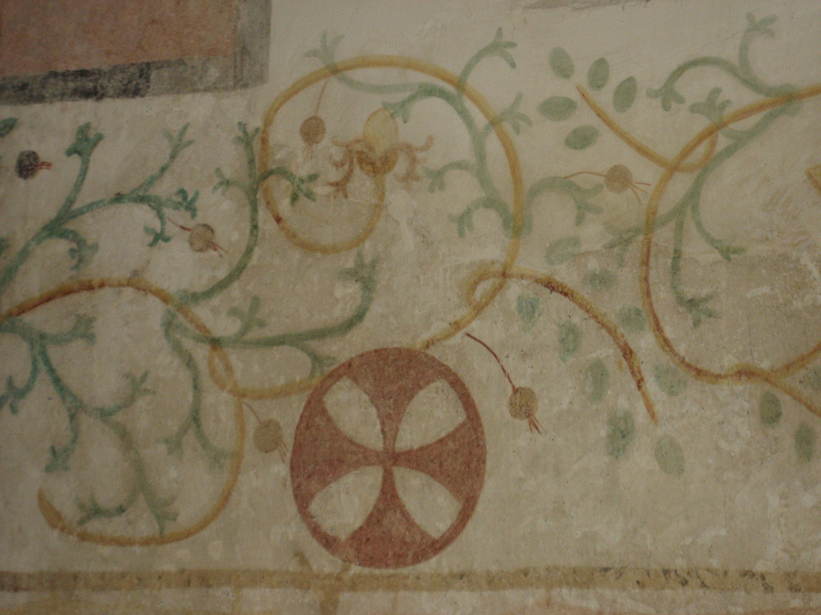 Der Innenraum der Kirche von Zerrenthin mit dem Wandmalereizyklus aus Rankenornamenten an der Südwand.